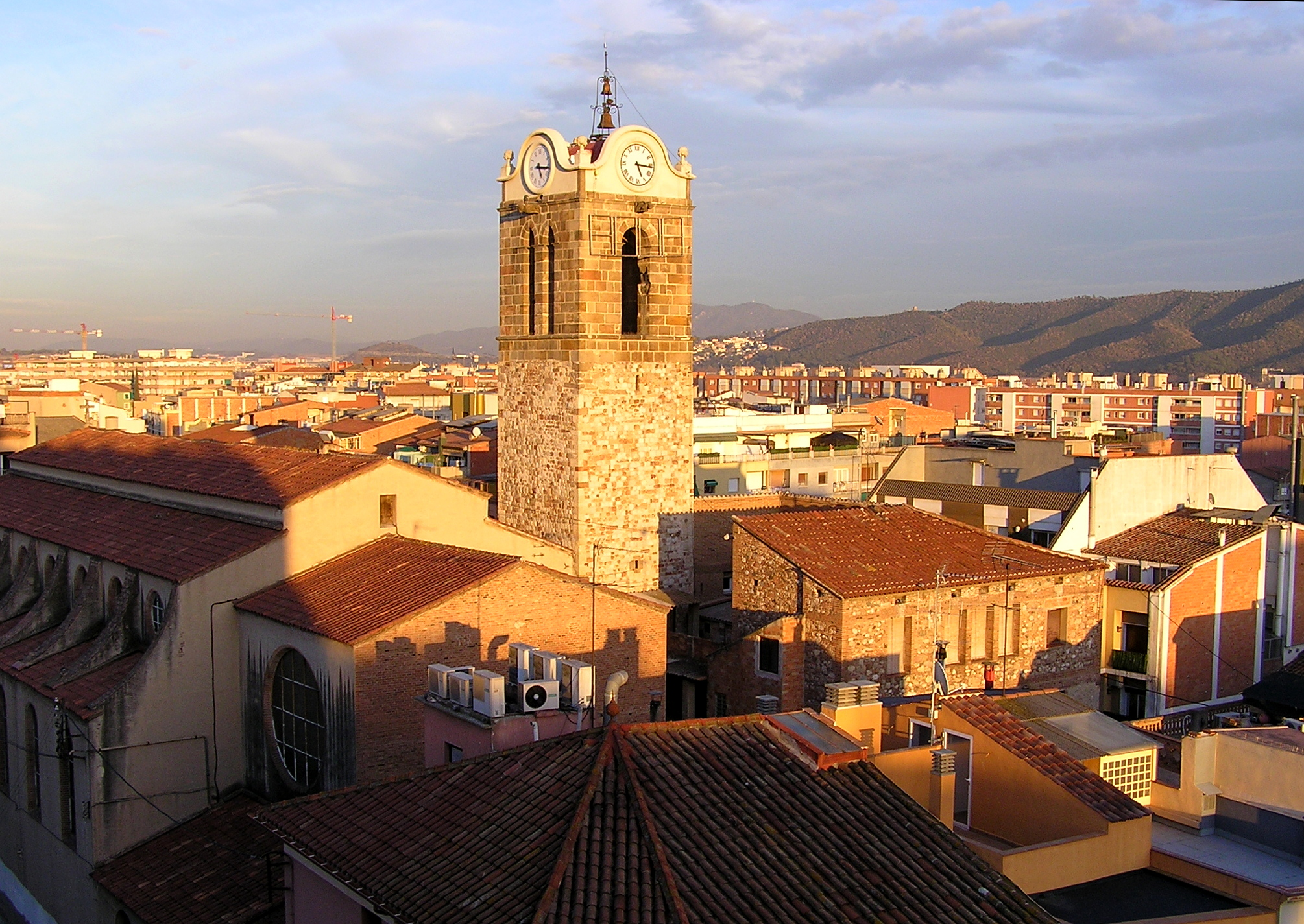 Mollet del Vallès, vista del campanar i edificis propers.